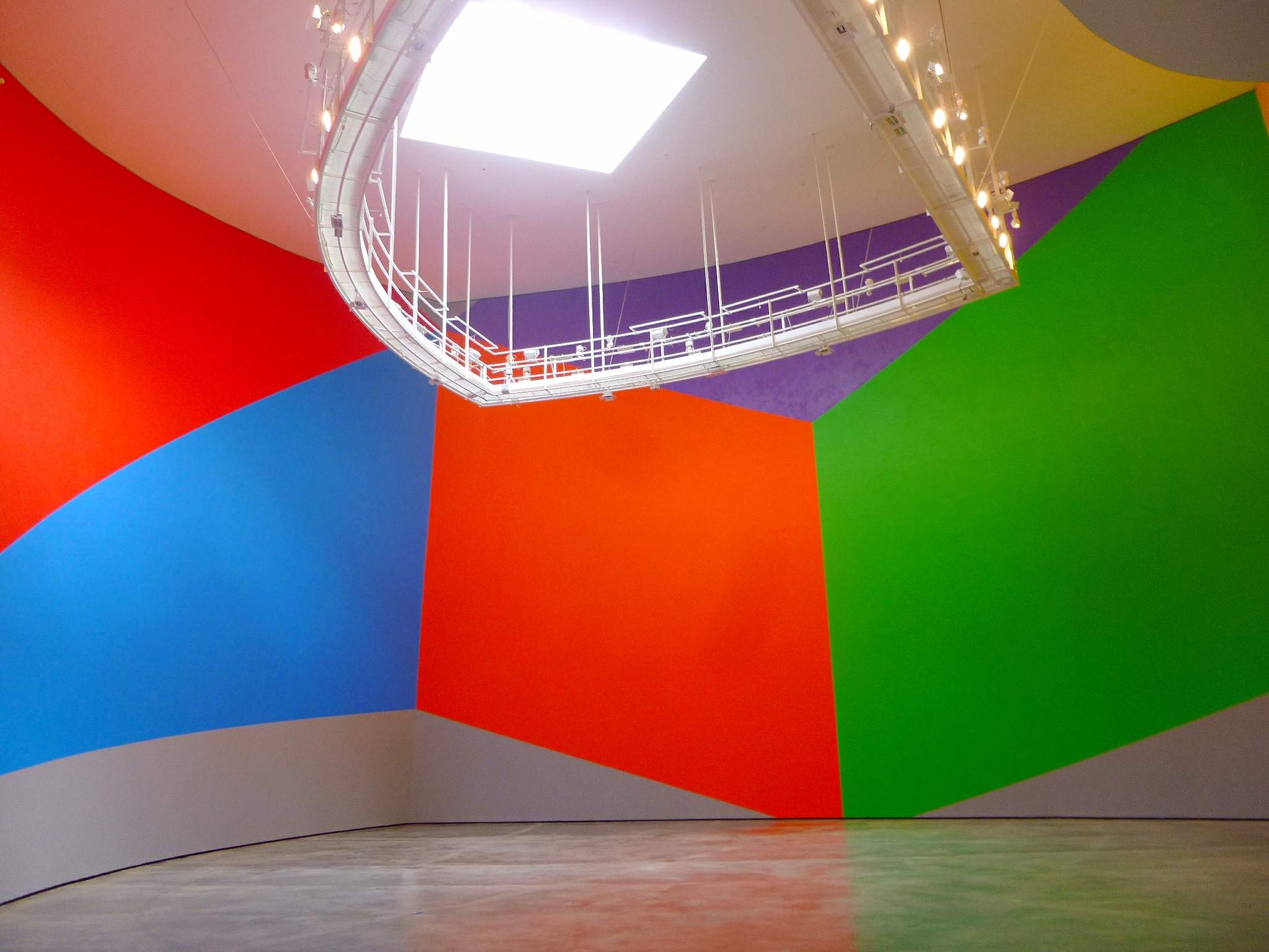 'Wall Drawing 831 (Geometric Forms)', de Sol LeWitt, en el Museo Guggenheim Bilbao